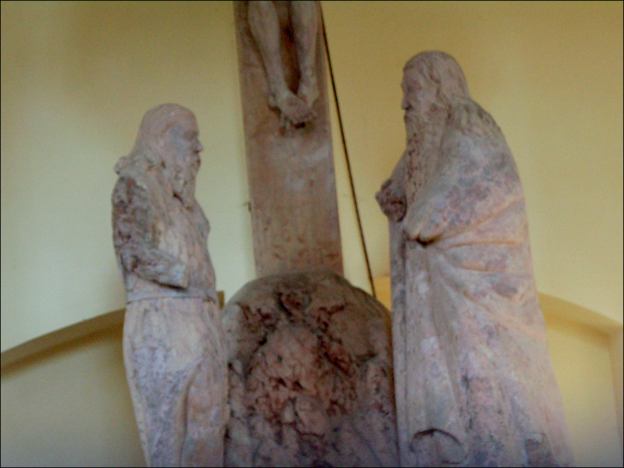 Svatý Jan pod Skalou, kaple sv. Kříže - interiér